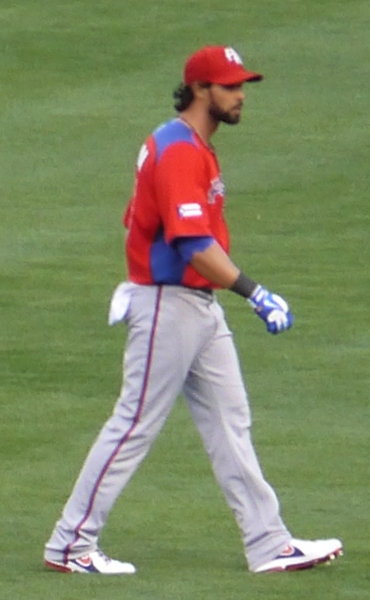 Ángel Pagán